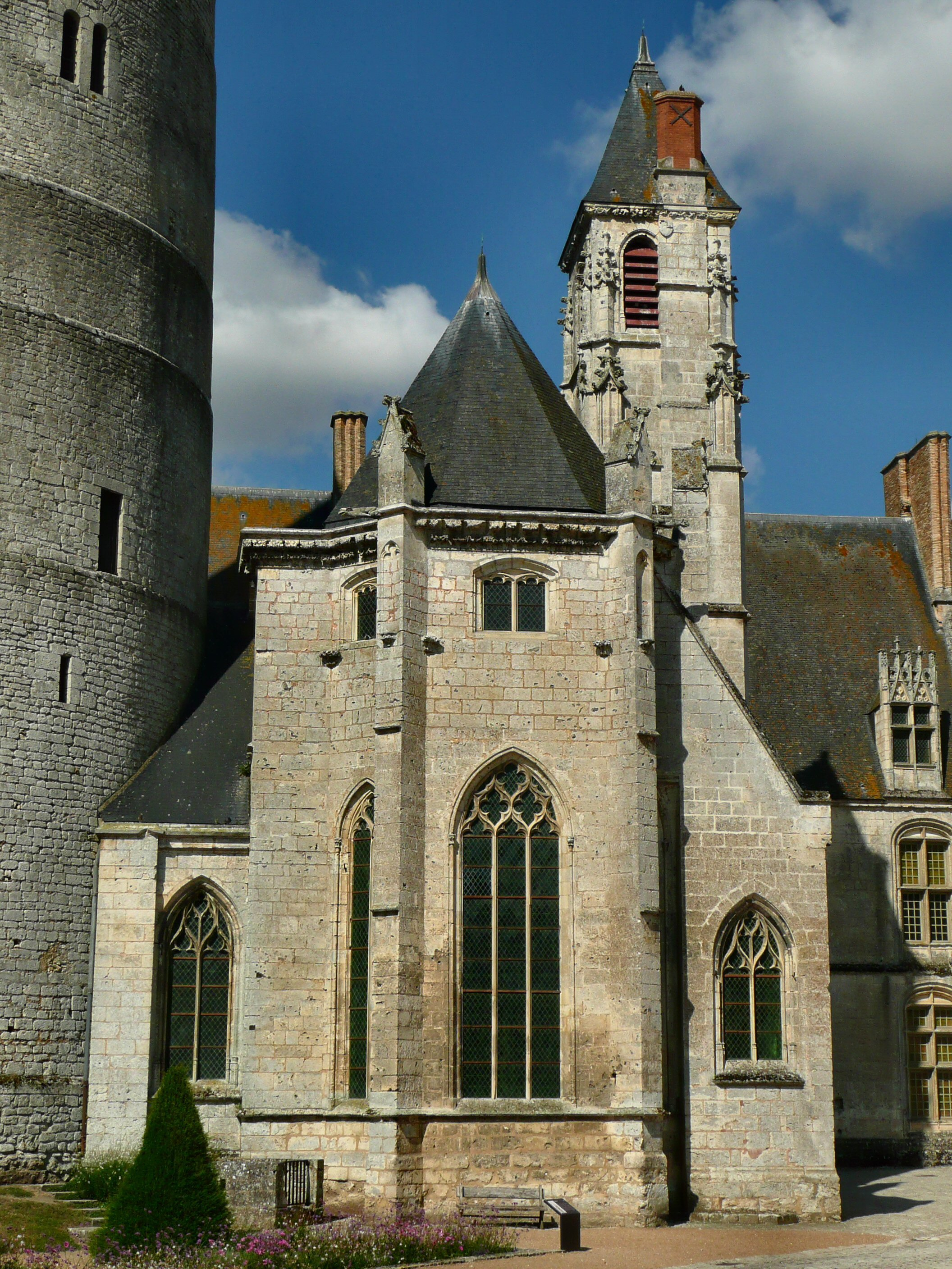 Chevet et clocher de la Sainte-Chapelle de Châteaudun